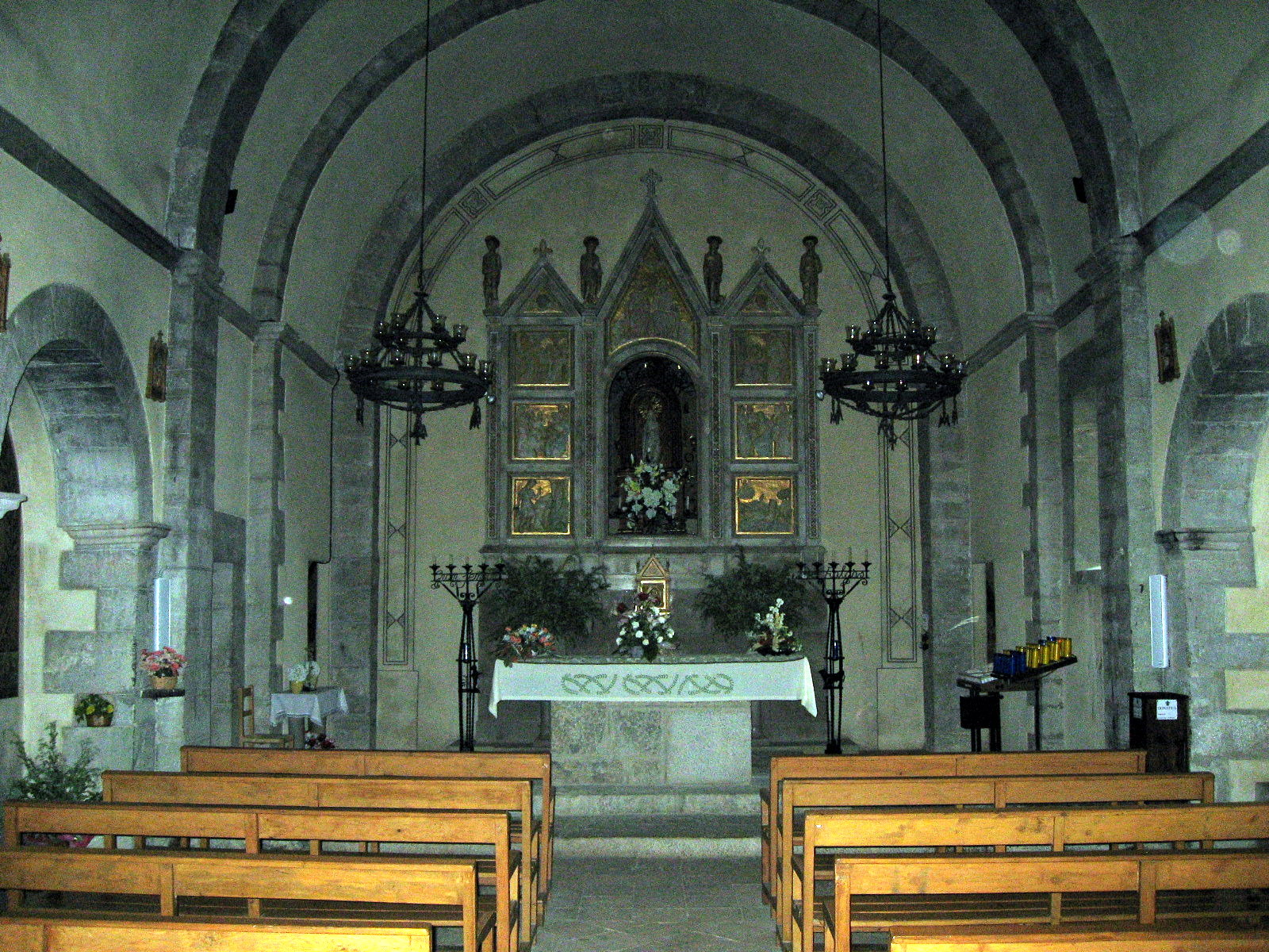 Interior dels Santuari de Falgars.